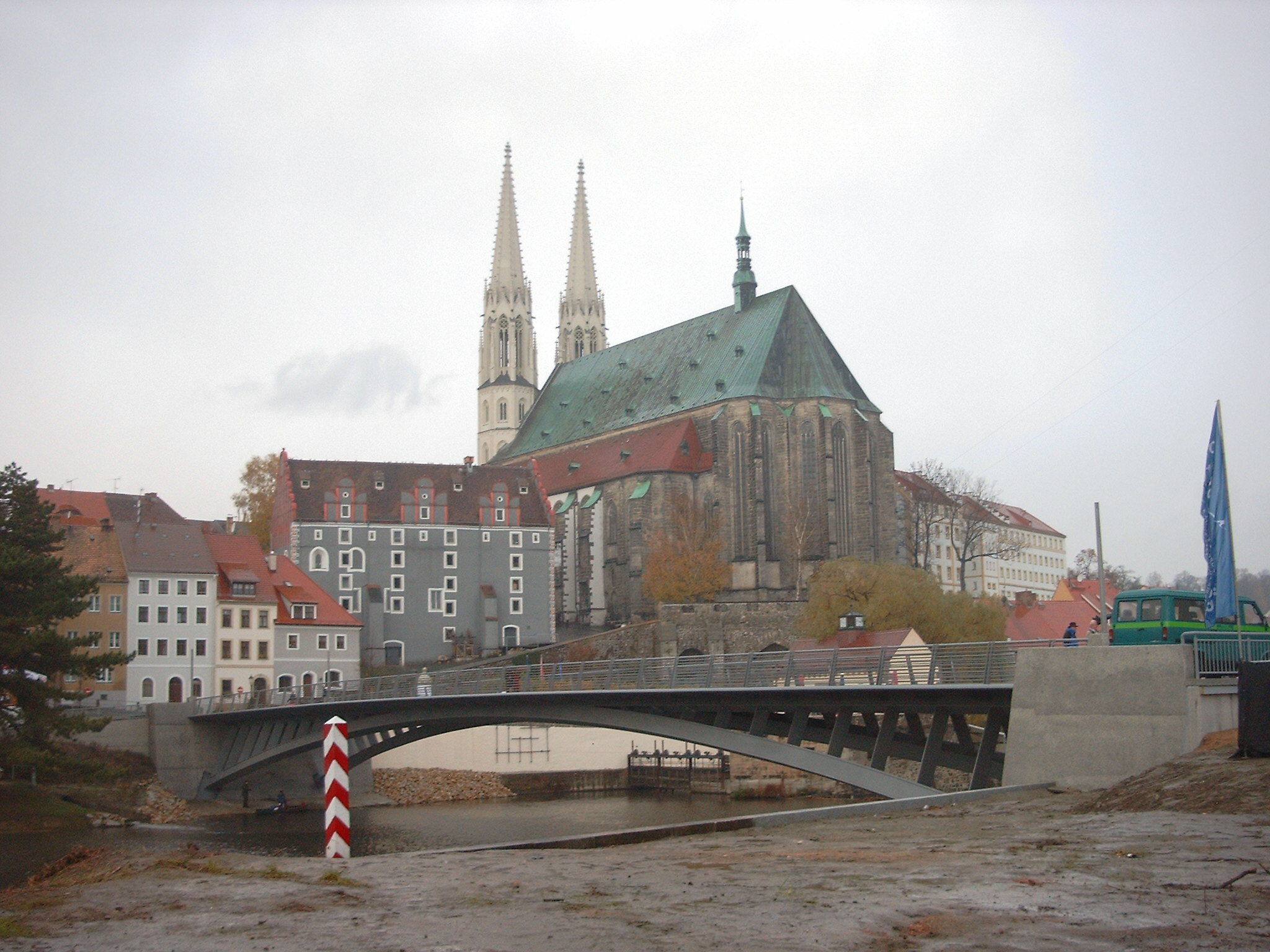 Görlitz, Altstadtbrücke mit Grenzübergang für Fußgänger und Radfahrer, Blick von der polnischen Seite auf die Görlitzer Altstadt im niederschlesischen Sachsen